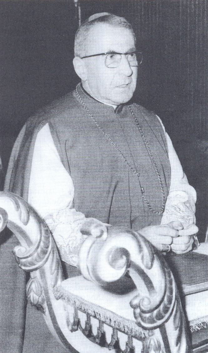 Albino Luciani da vescovo di Vittorio Veneto